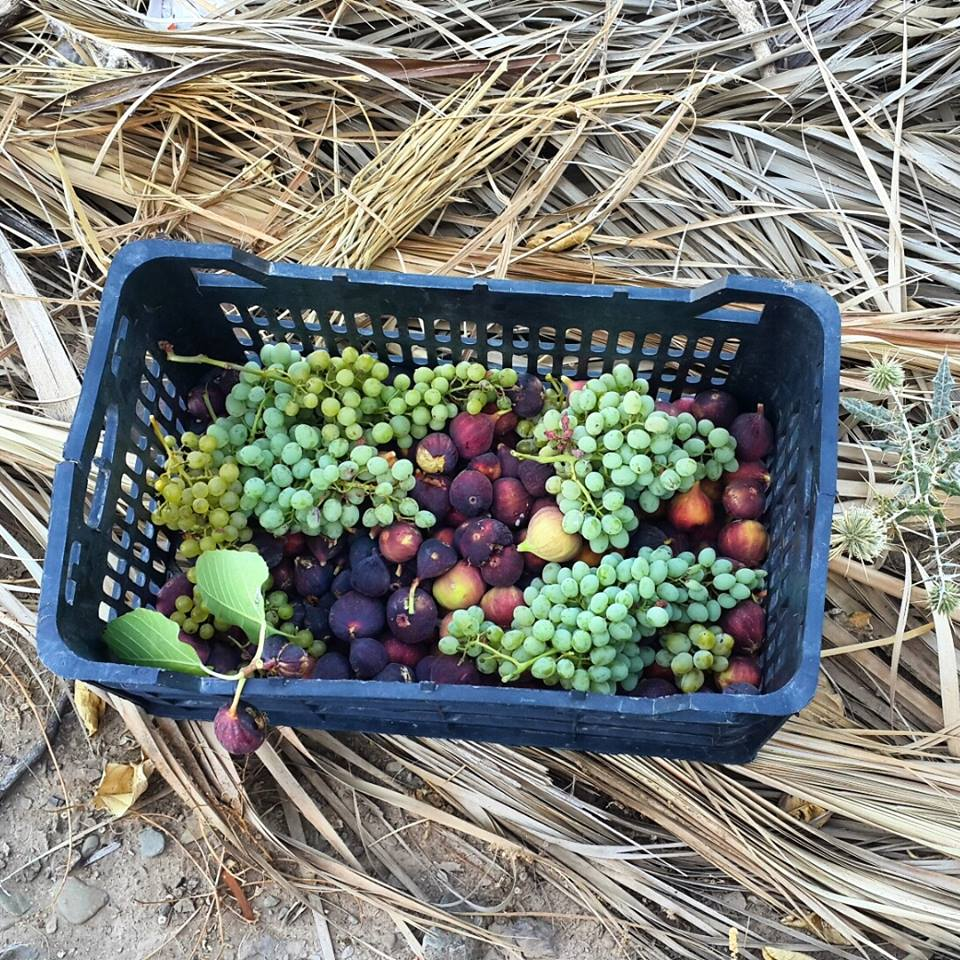 نگاره میوه محلی لاشار